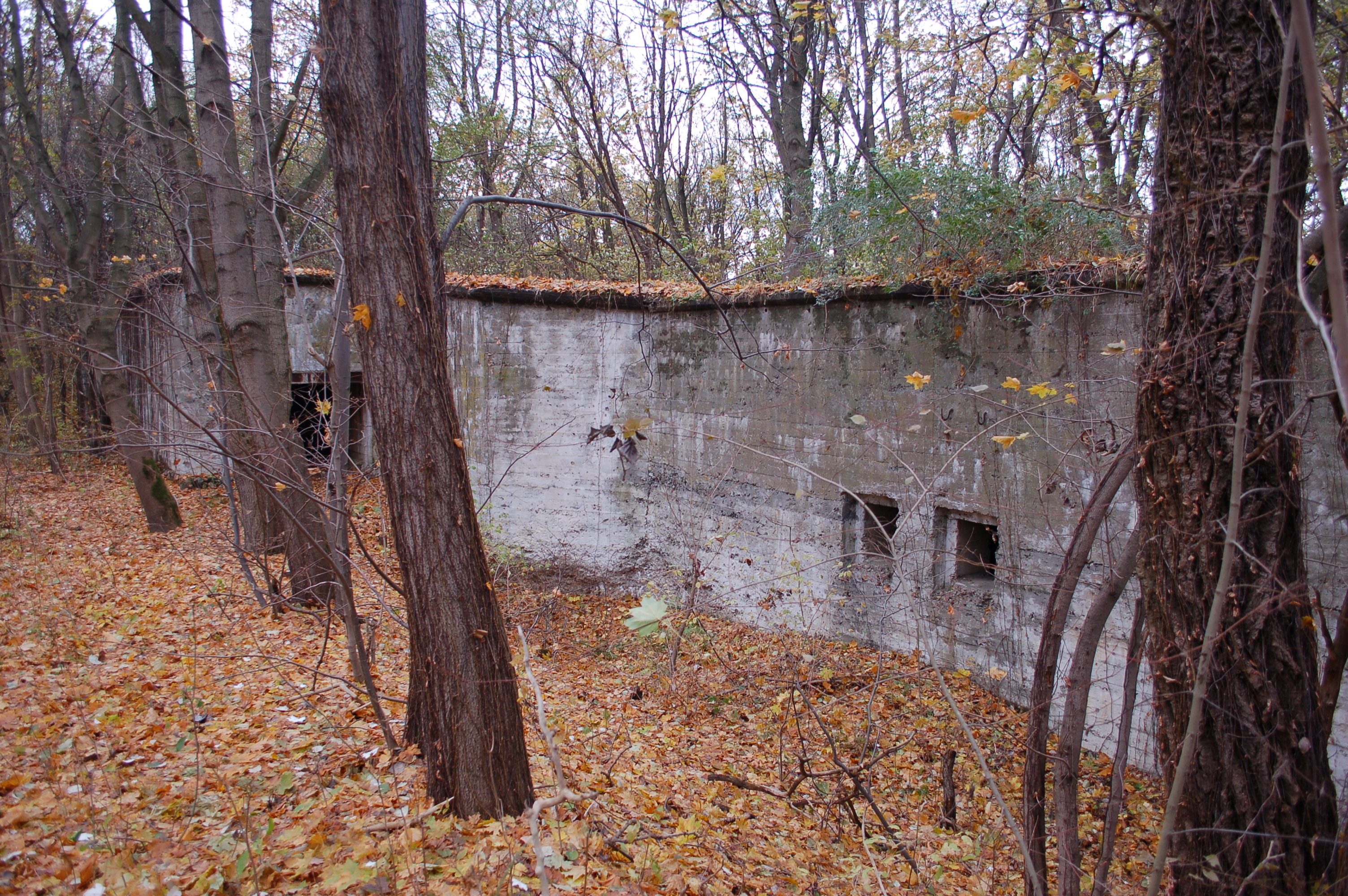 Small Fort of Zegrze Fortress